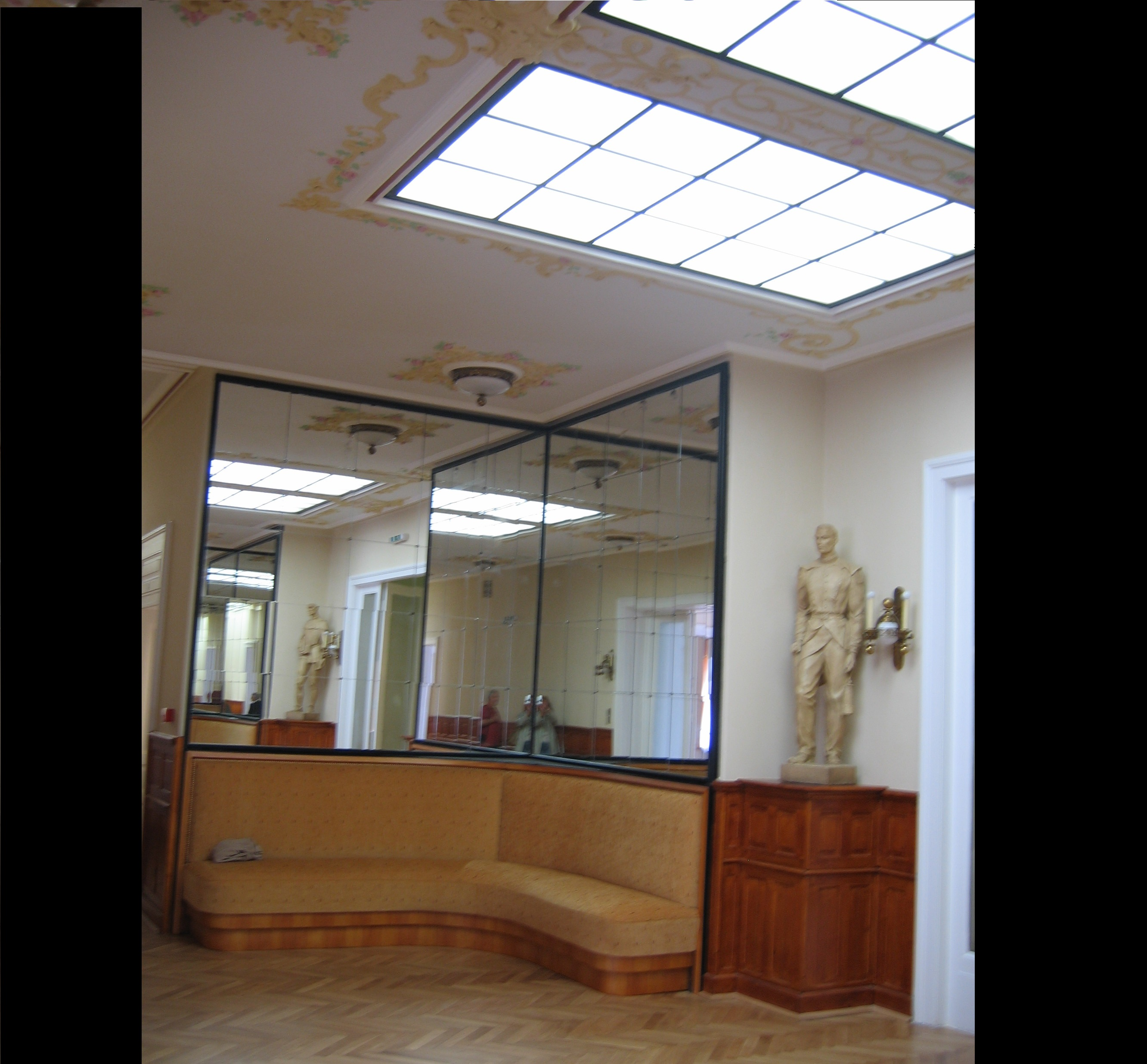 Tükörterem rejtett világítással